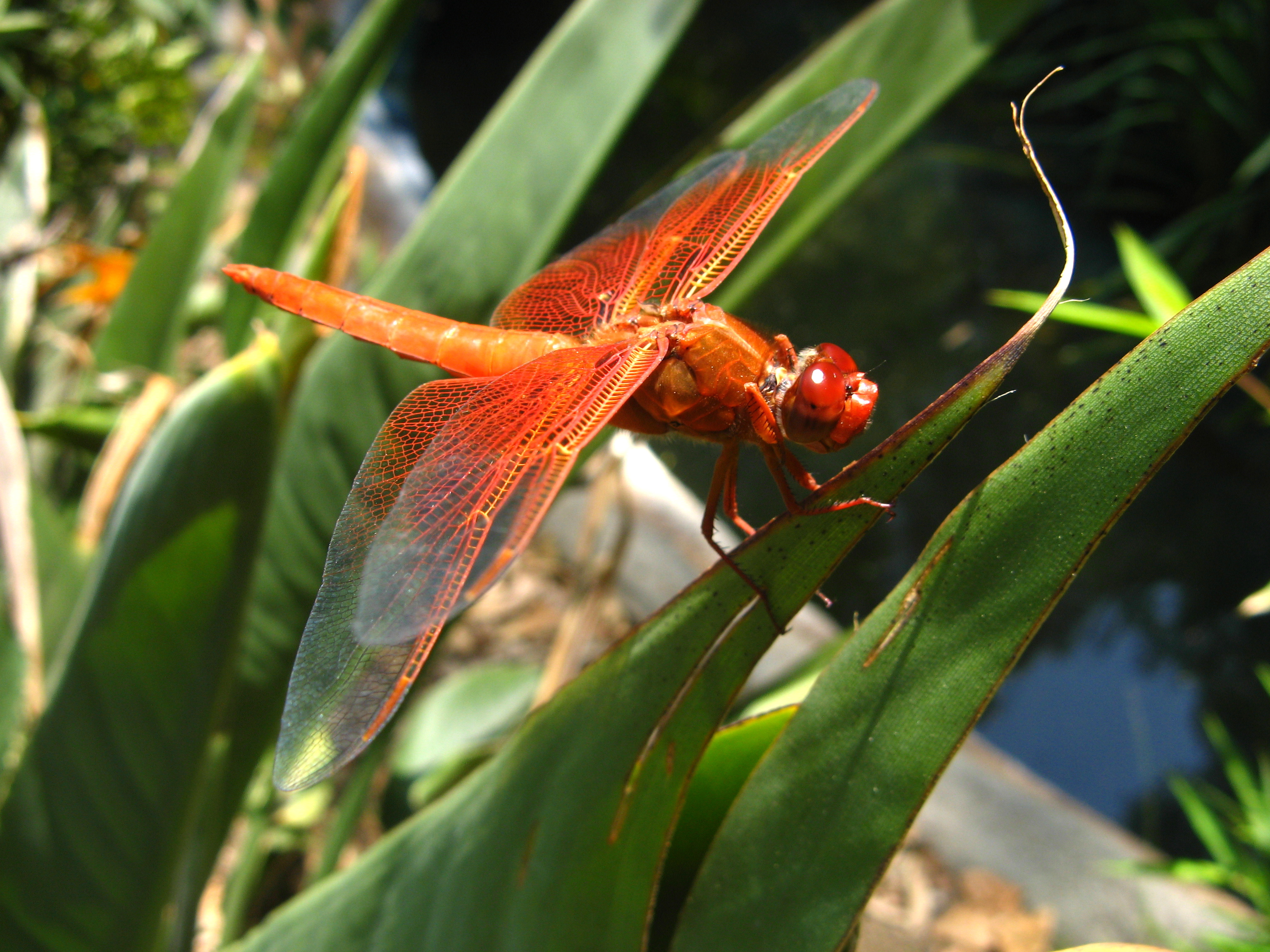 Libellula saturata